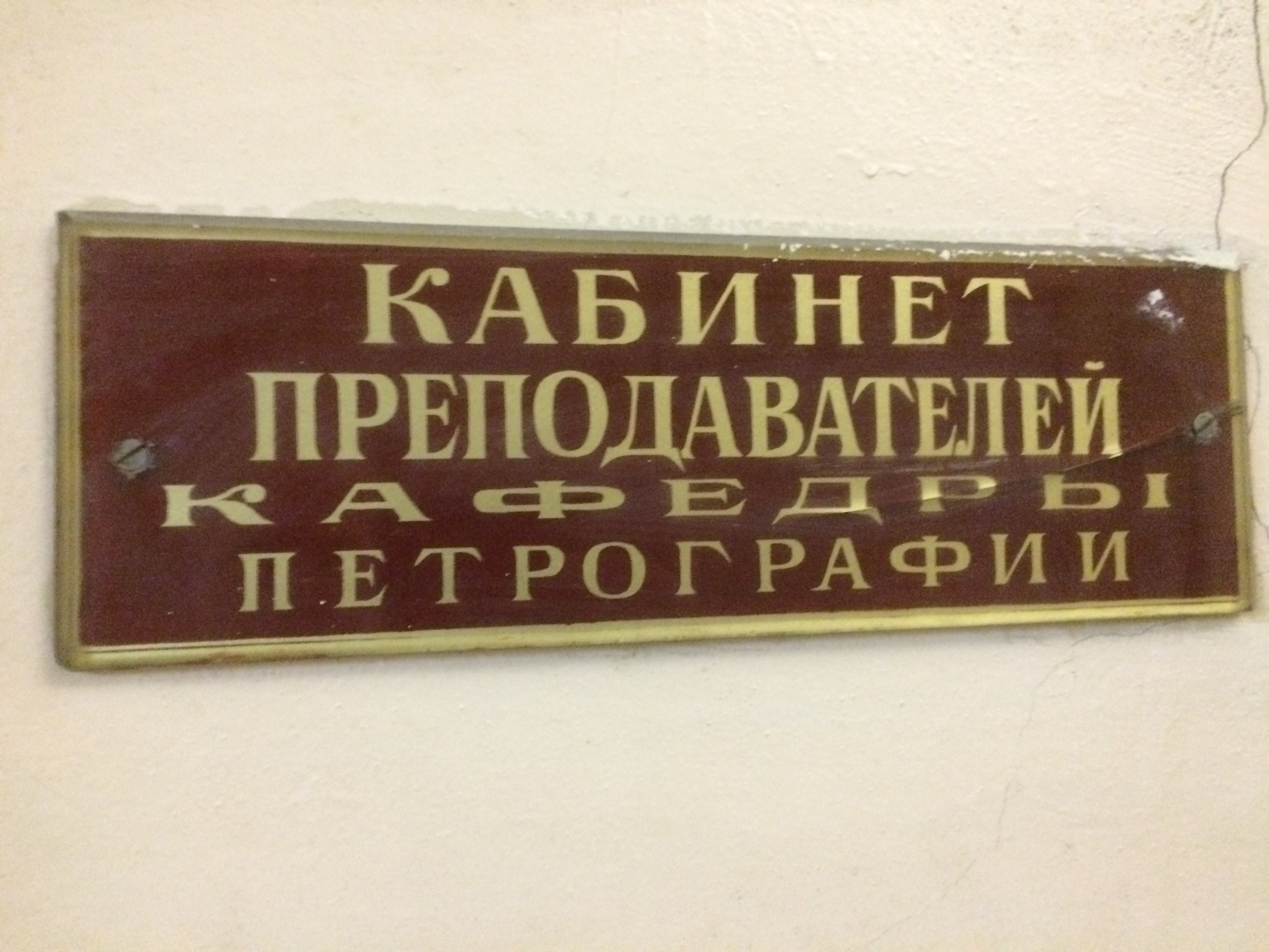 Табличка на кабинете Геологического факультета МГУ